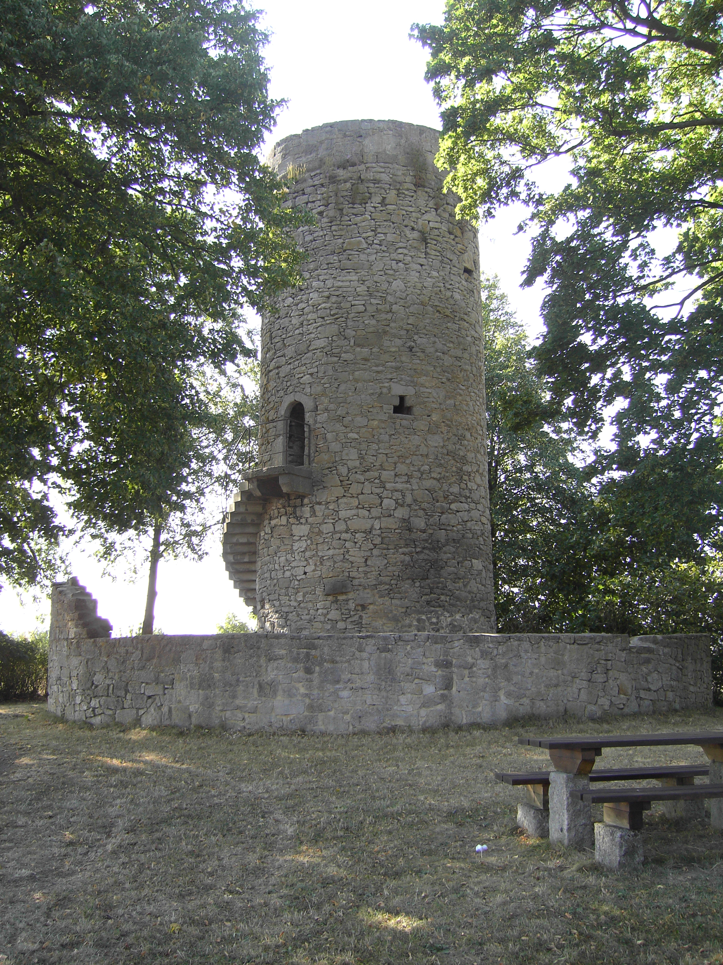 Galgenturm, Ansicht von Osten mit Umfassungsmauer